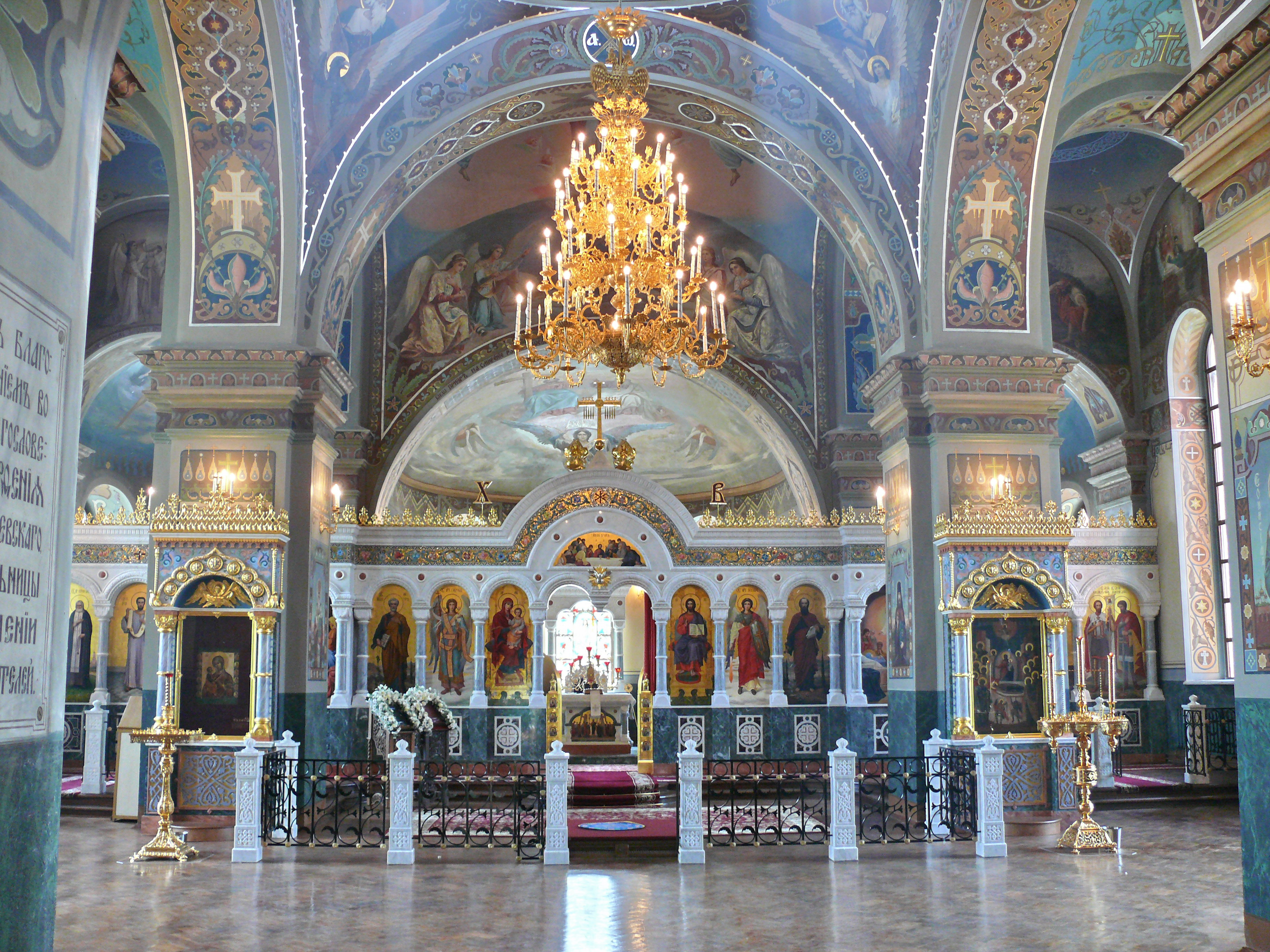 Церковь Успения Пресвятой Богородицы (Старый собор Успенского монастыря) (Тульская область, Тула, Менделеевская улица, 13 (лит. Л))